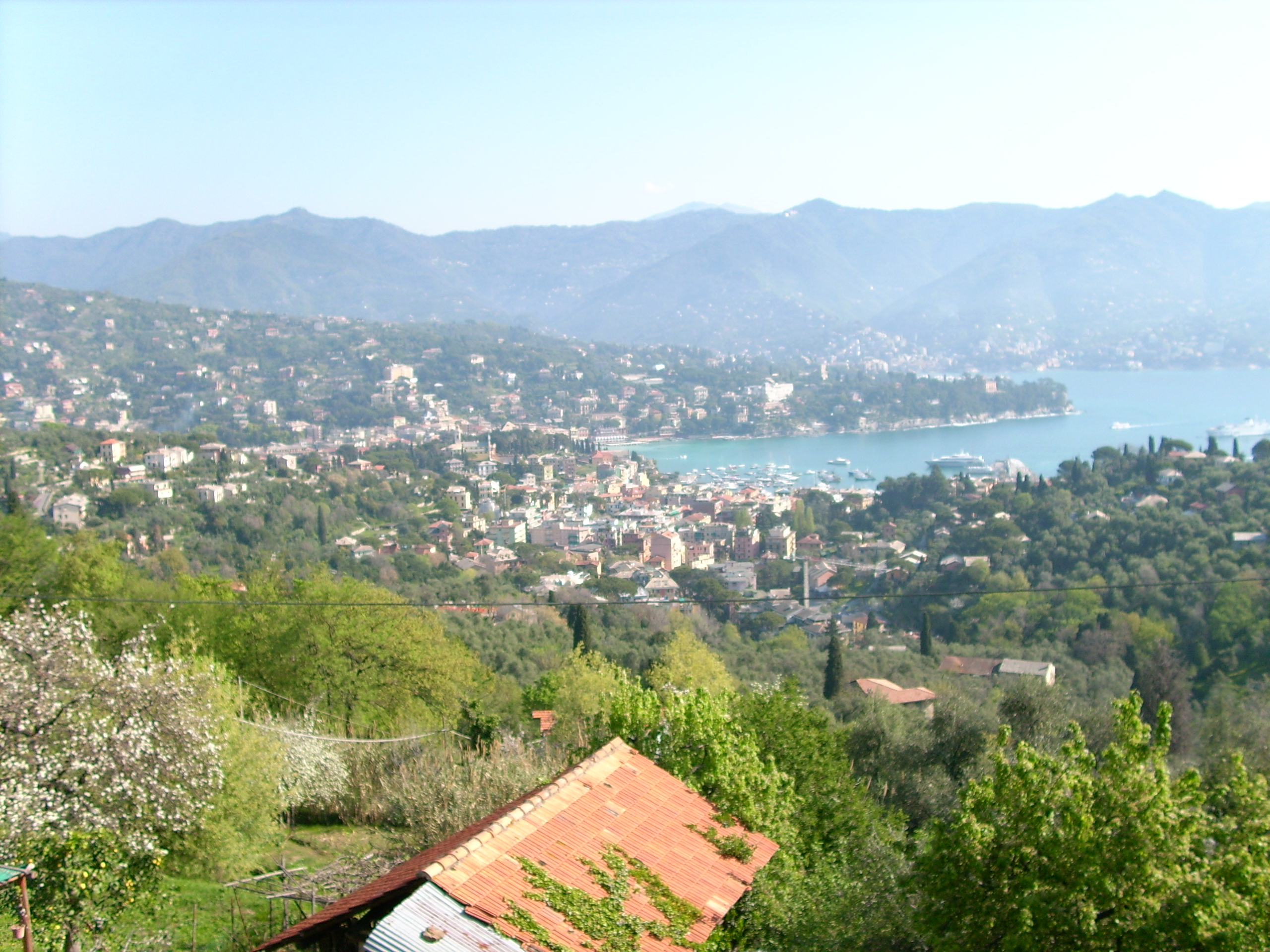 Vista panoramica di Santa Margherita Ligure dalla frazione di Nozarego